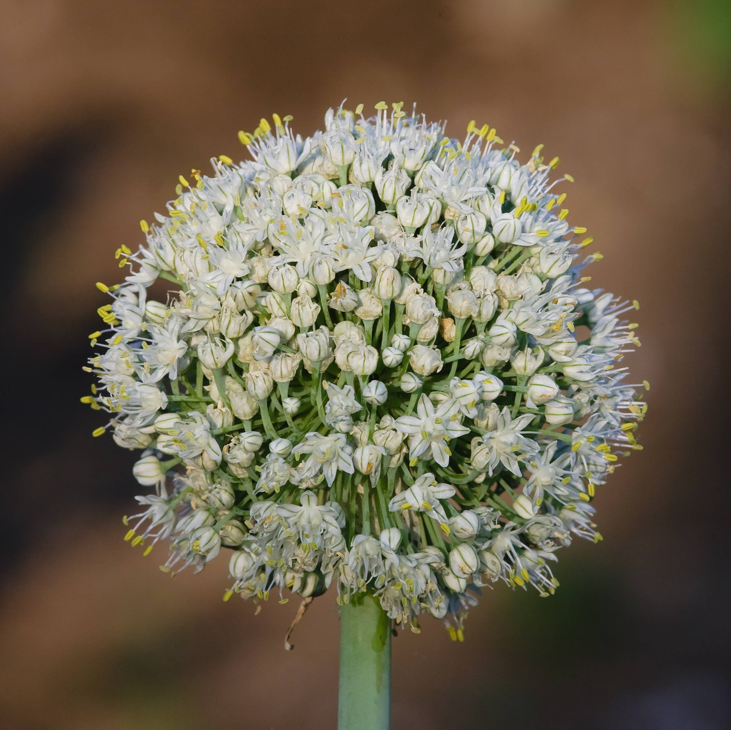 Blütenstand einer Zwiebel